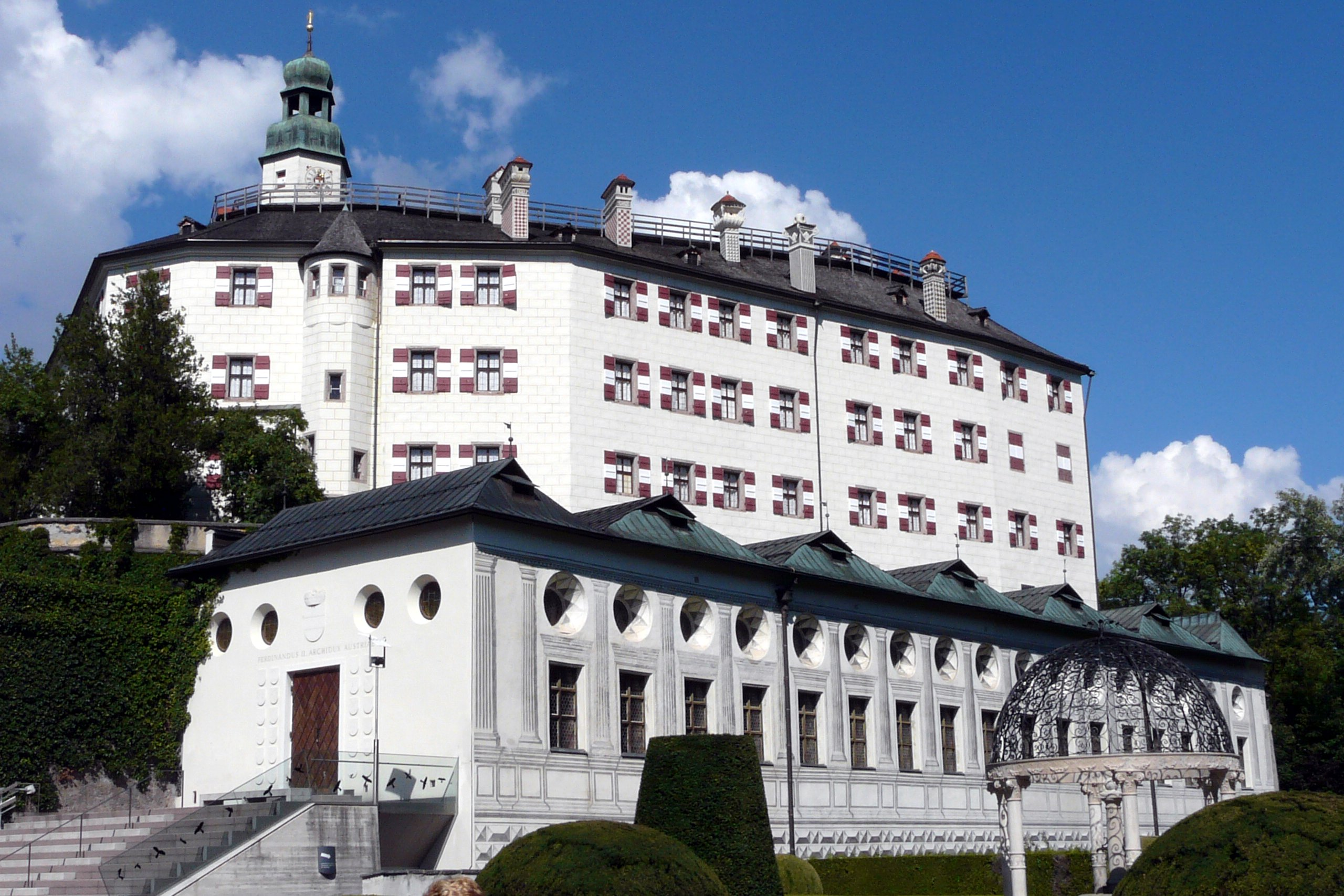 extérieur du chateau d'Ambras Emmanuel BRUNNER (manu25) aout 2008